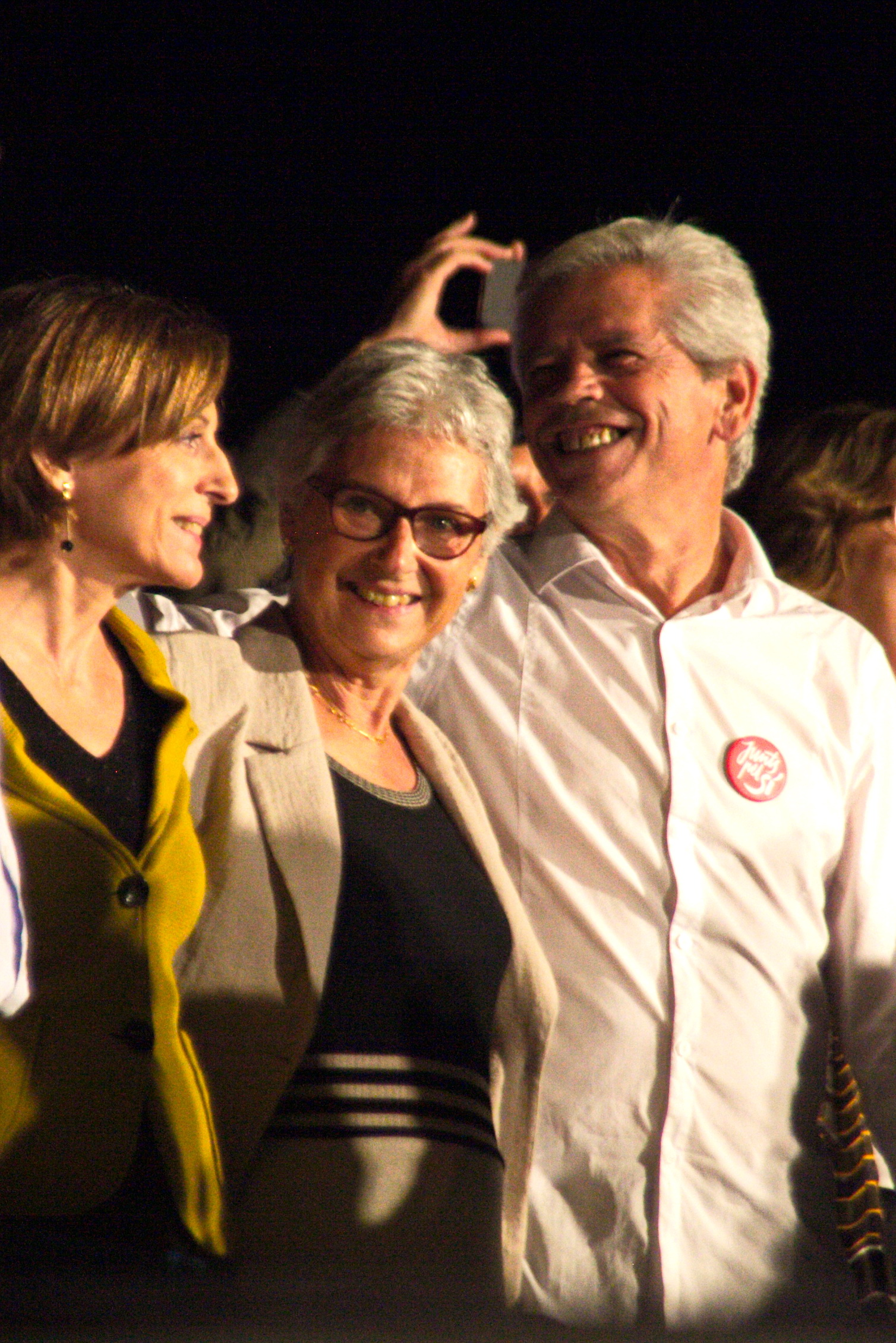 Carme Forcadell, Muriel Casals i Eduardo Reyes a l'acte de cloenda de Junts pel Si durant la campanya electoral de 2015. 25-9-2015